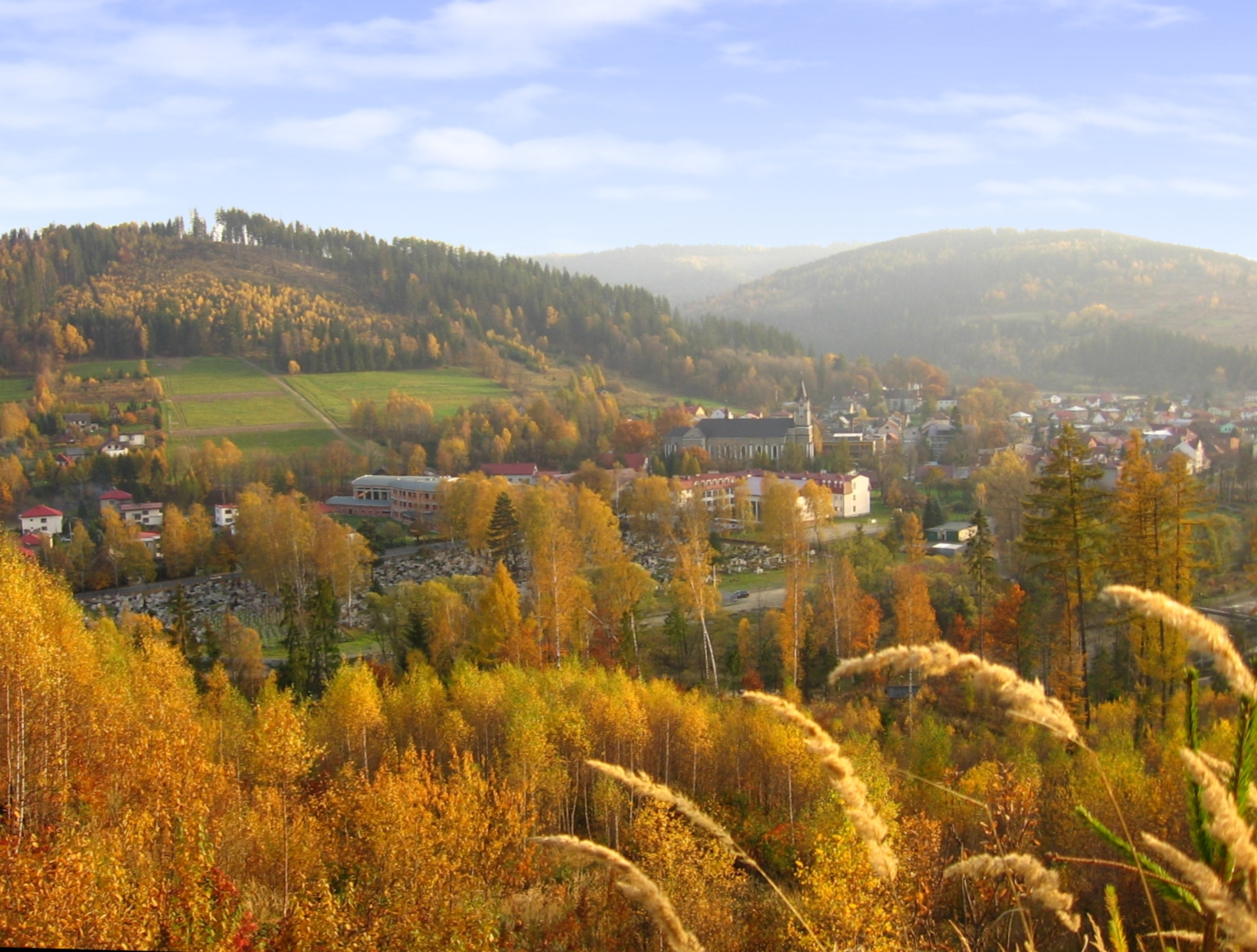 Rajcza z Biernatki